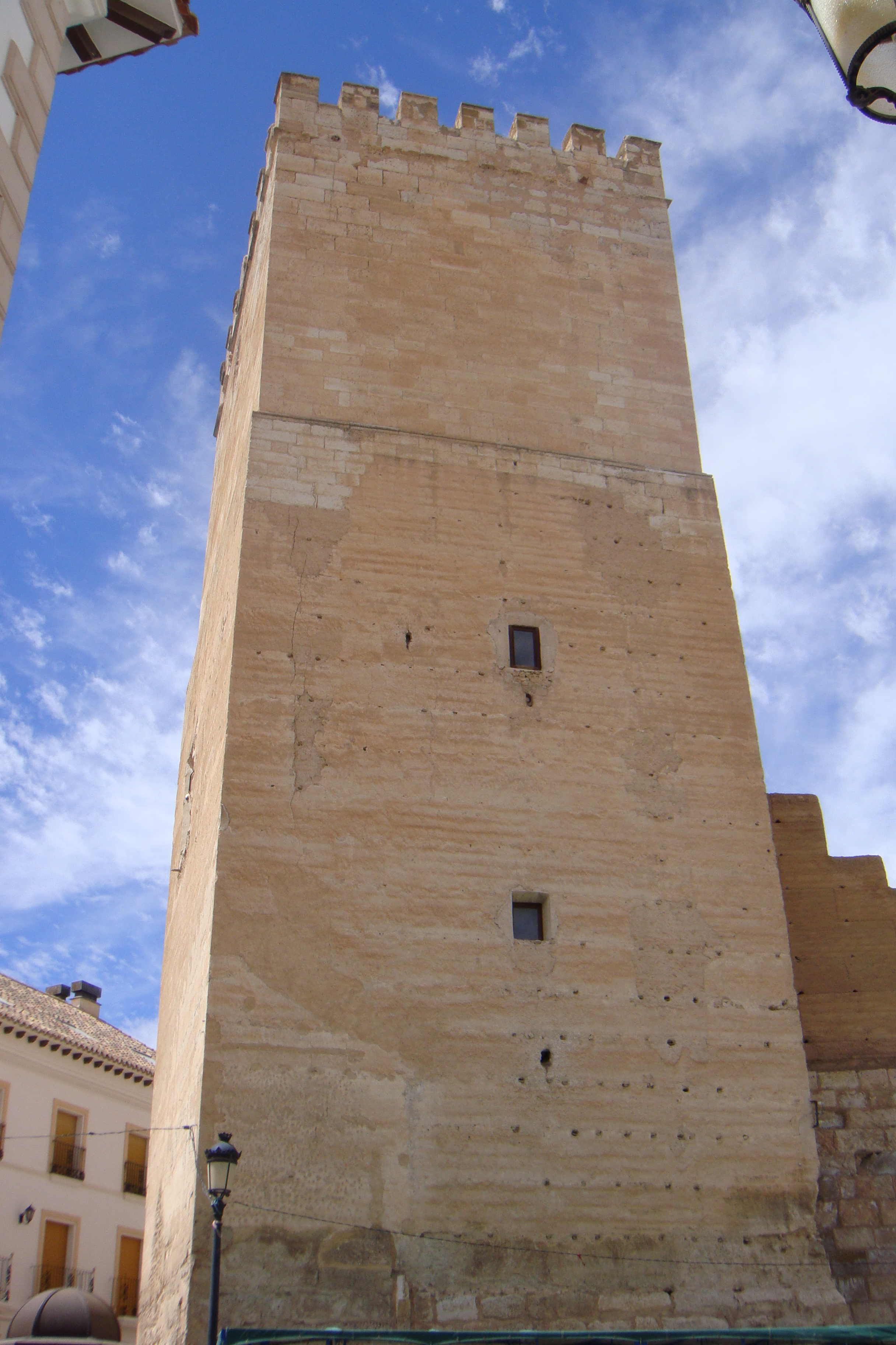 Localidad de Orce